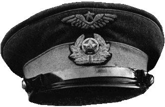 Фуражка 1941